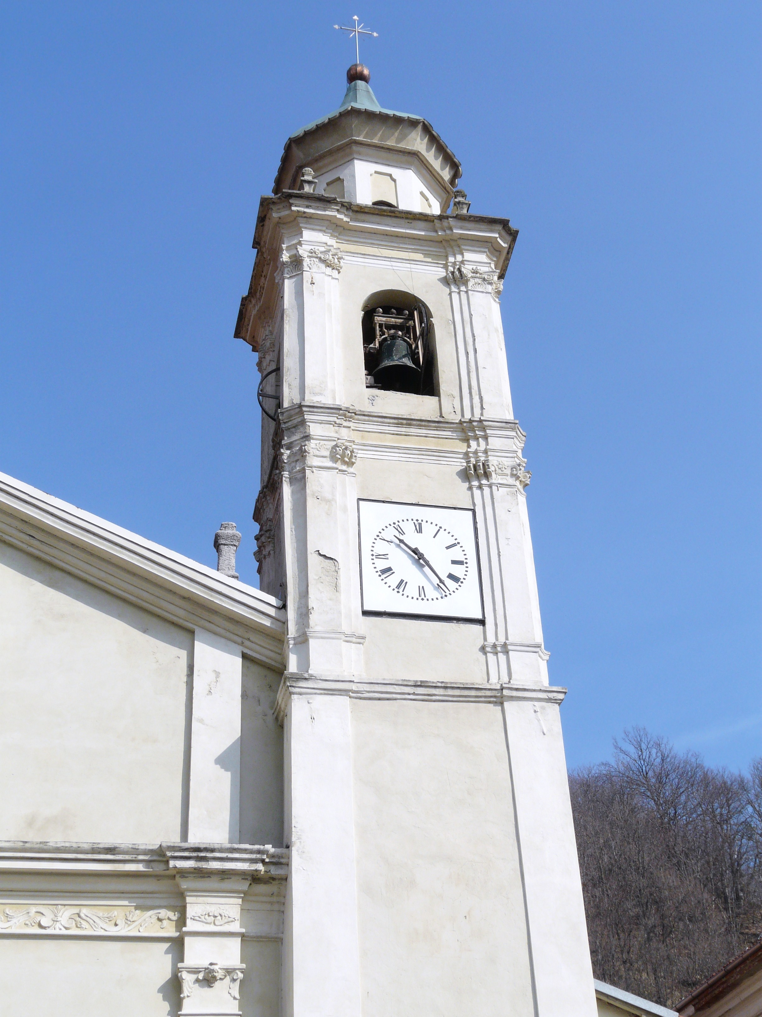 Campanile della chiesa di San Marco, Pallare, Liguria, Italia